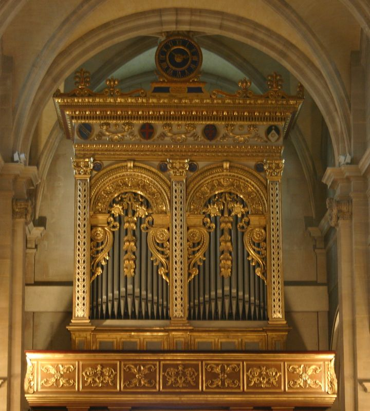 Eglise Saint Pierre Saint Paul - Rueil-Malmaison - orgue